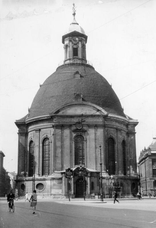 Berlin, Dreifaltigkeitskirche Vorkriegs-Berlin. Dreifaltigkeitskirche (in der Mauerstraße, Ziethenplatz) Aufn.: Illus/Brenner 2522-48 ADN-ZB/Archiv Berlin um 1930: Die Dreifaltigkeitskirche in der Mauerstraße. (Aufn.: Brenner) 2522-48